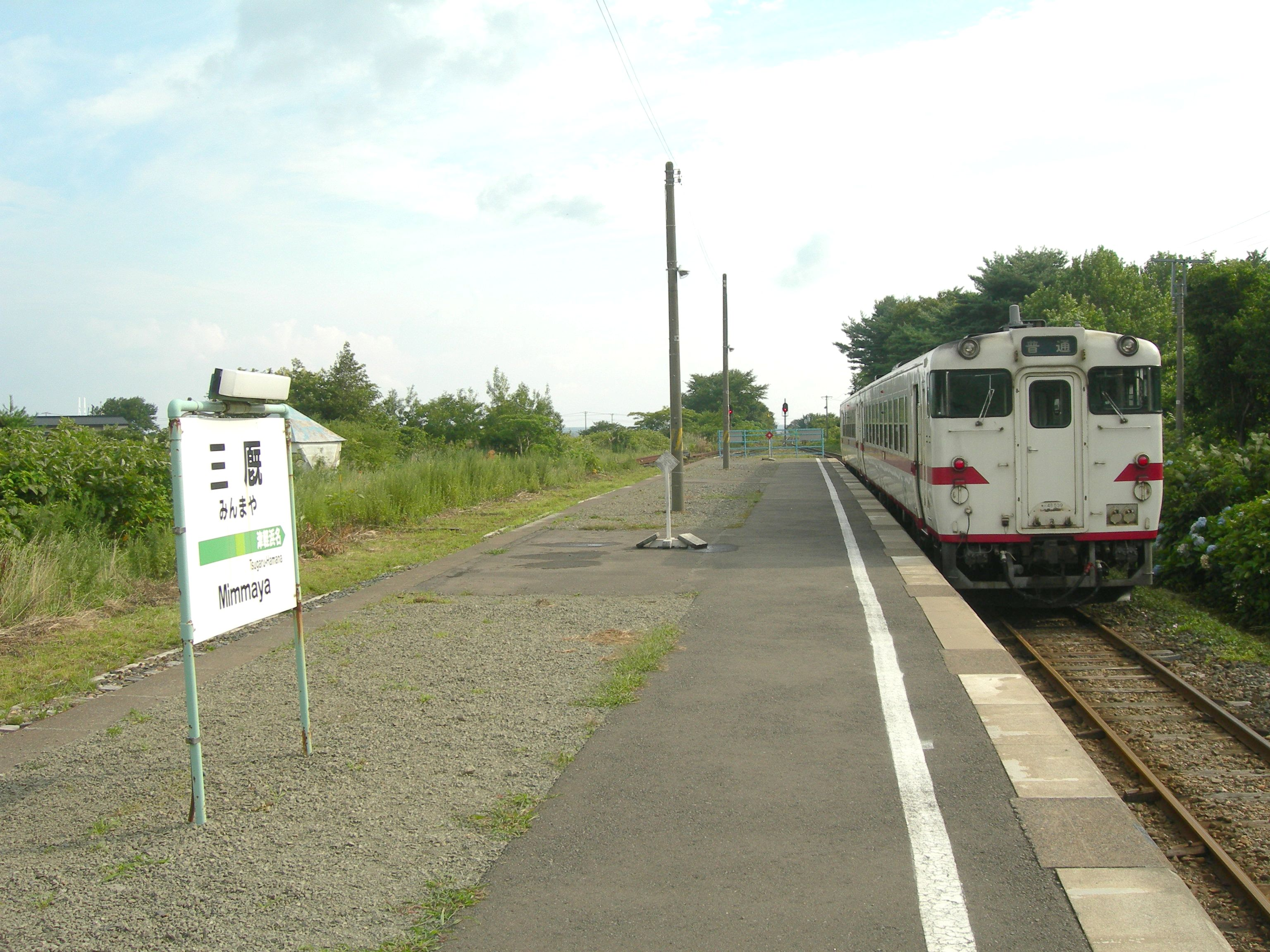 三厩駅ホーム